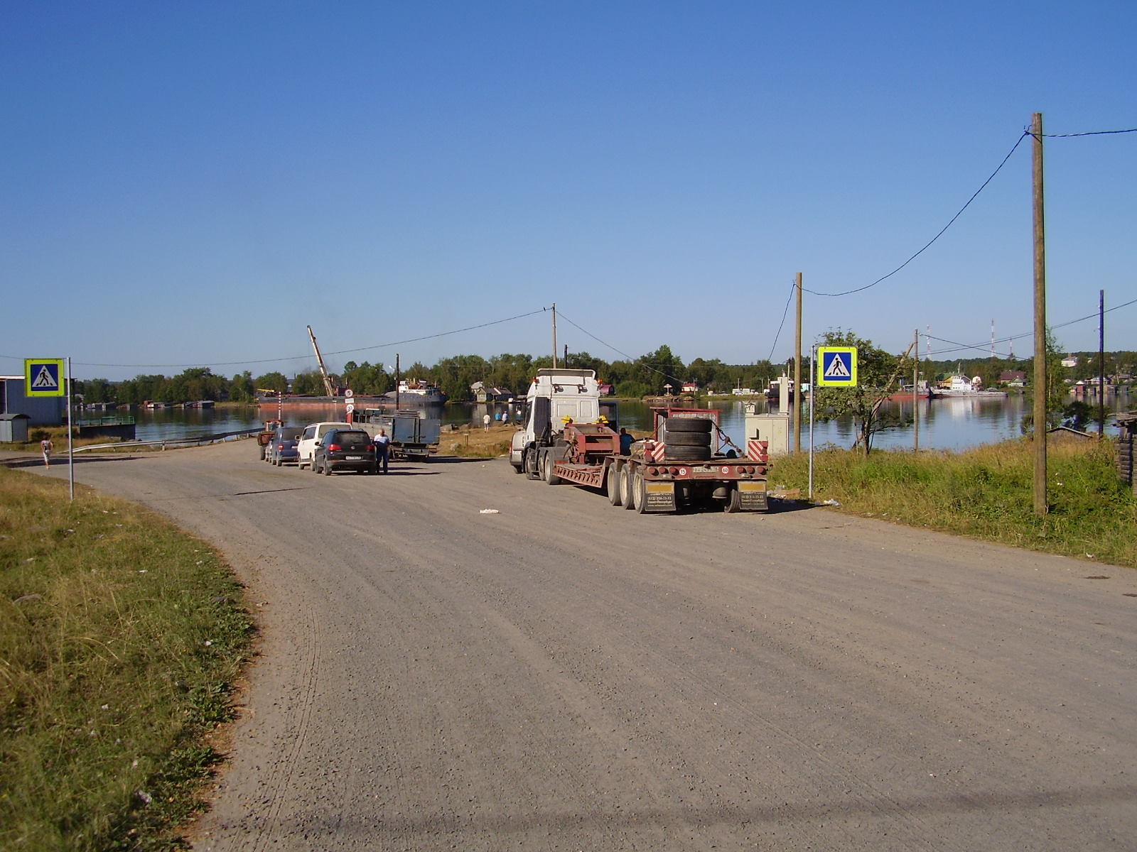 Lossi Syvärinniskalla.